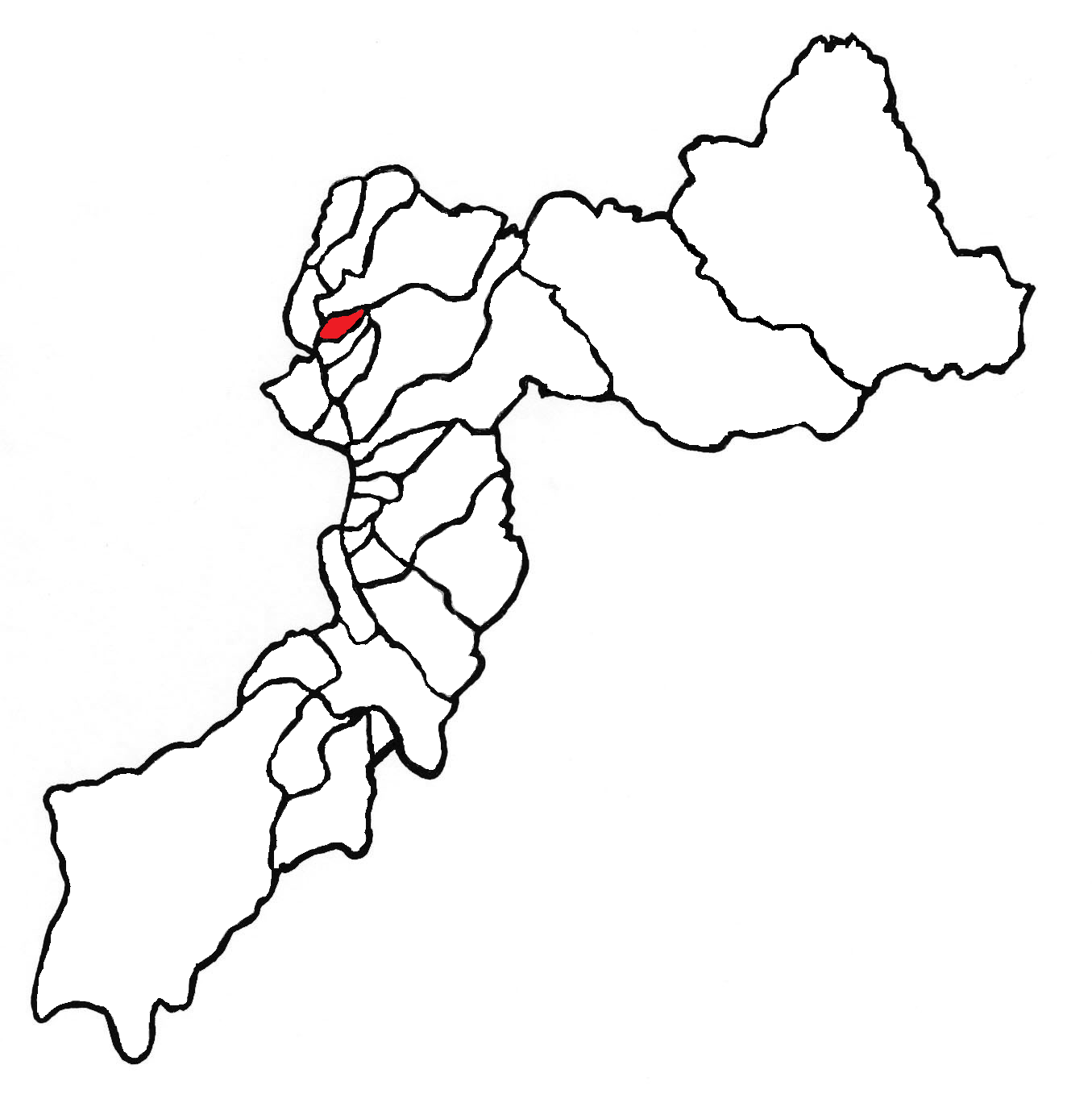 Ubicación del distrito en la provincia de Huancayo, departamento de Junín, Perú